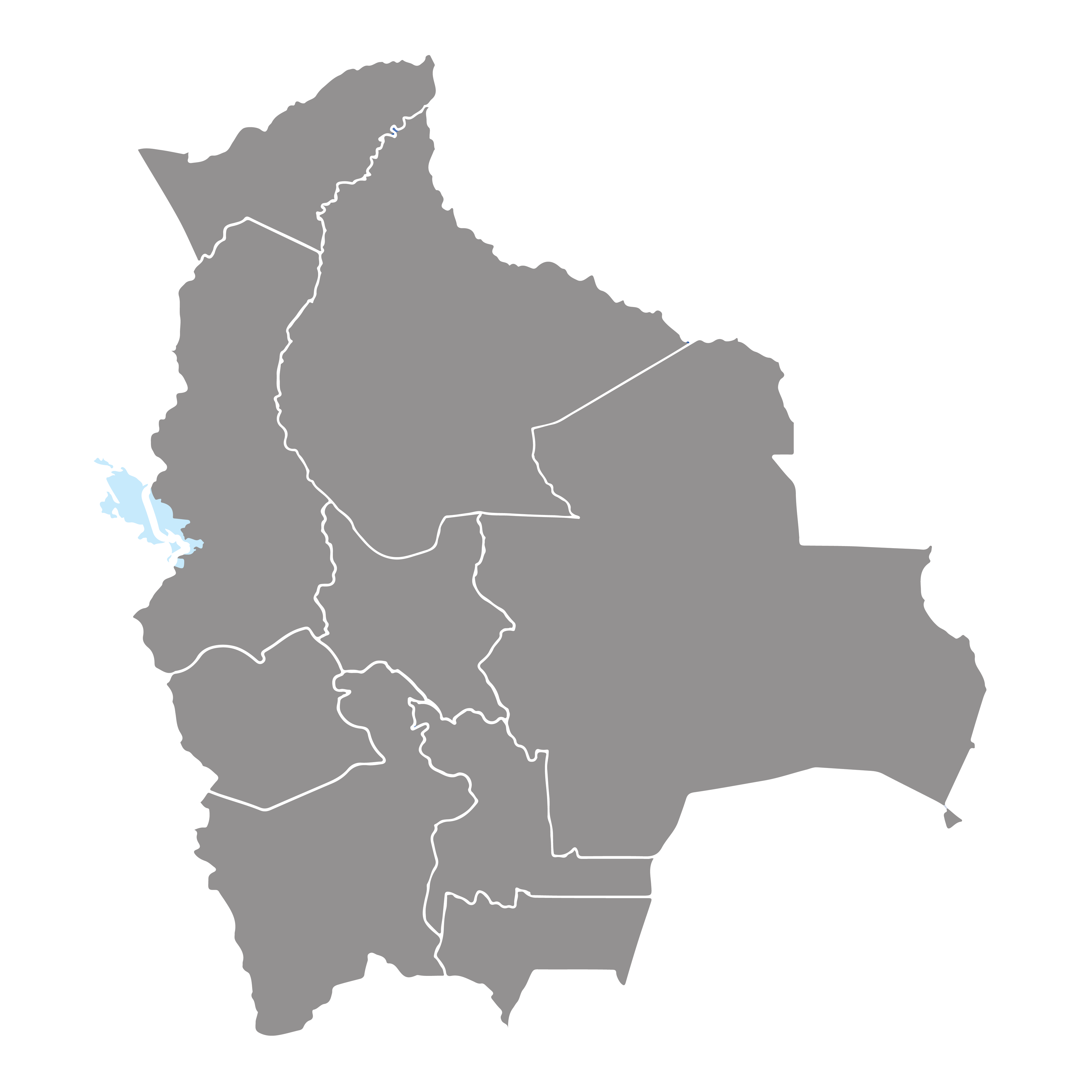 Ganador(es) en los 9 departamentos en las Elecciones Generales de Bolivia de 2020